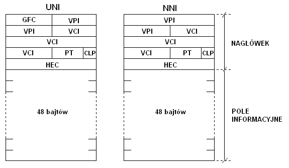 KomórkaATM